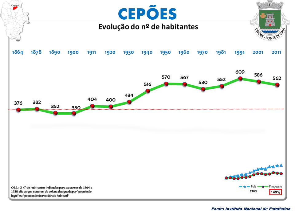 Censos 1864/2011